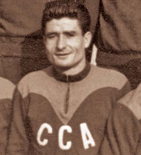 Ion Voinescu